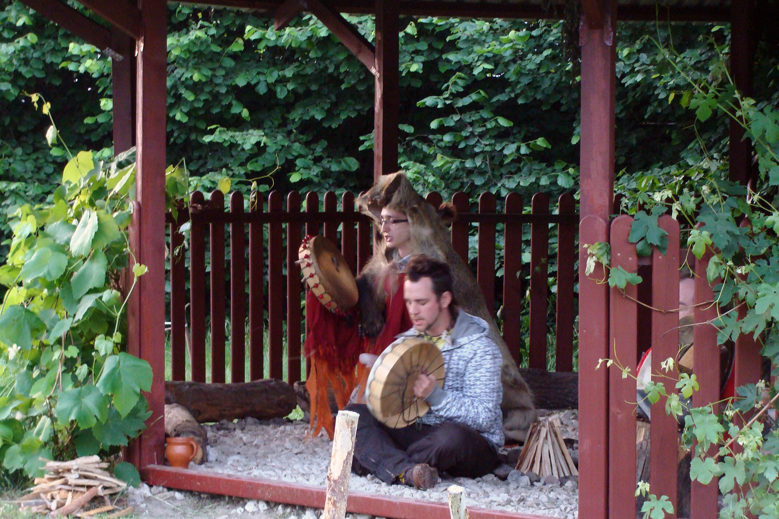 Noc Kupały 2010 Rodzimy Kościół Polski - gościnnie zaproszeni współcześni szamani.